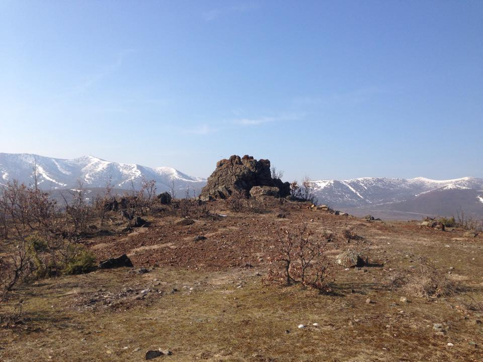 pososva1